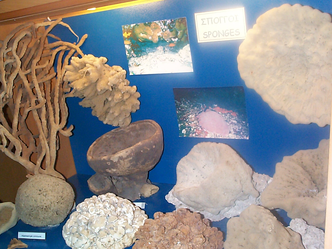 Szivacsok a rodoszi akváriumban